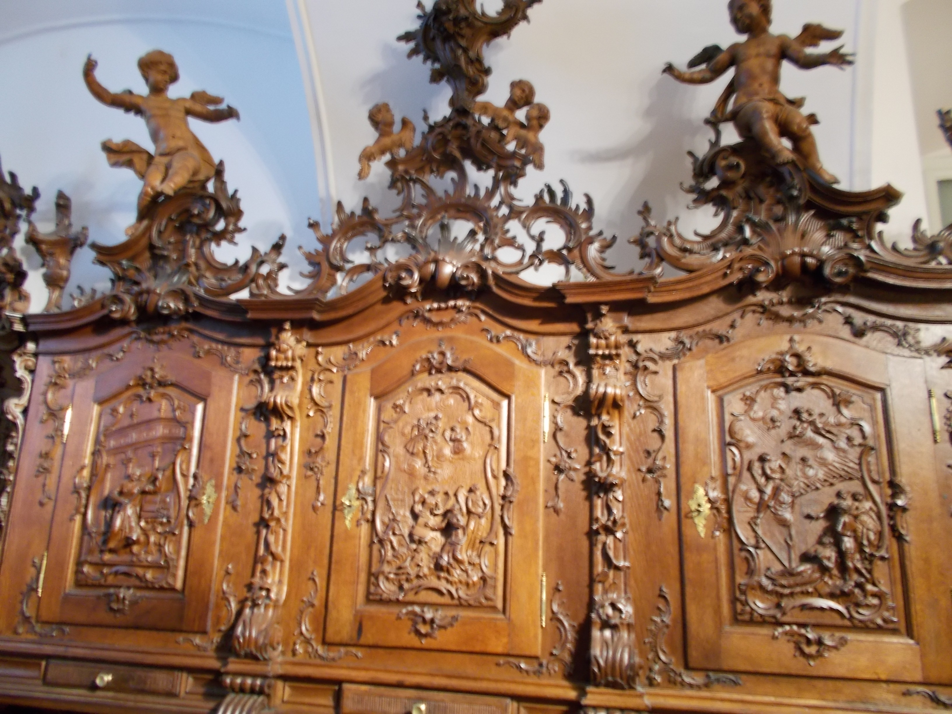 Nagyboldogasszony-Nepomuki Szent János Római katolikus templom. Műemlék ID 3829. Sekrestye, pálos szerzetes. Pad. - Magyarország, Fejér megye, Székesfehérvár, Belváros, Székesfehérvár, Fő utca 6., János köz 2. This is a photo of a monument in Hungary. Identifier: 3829